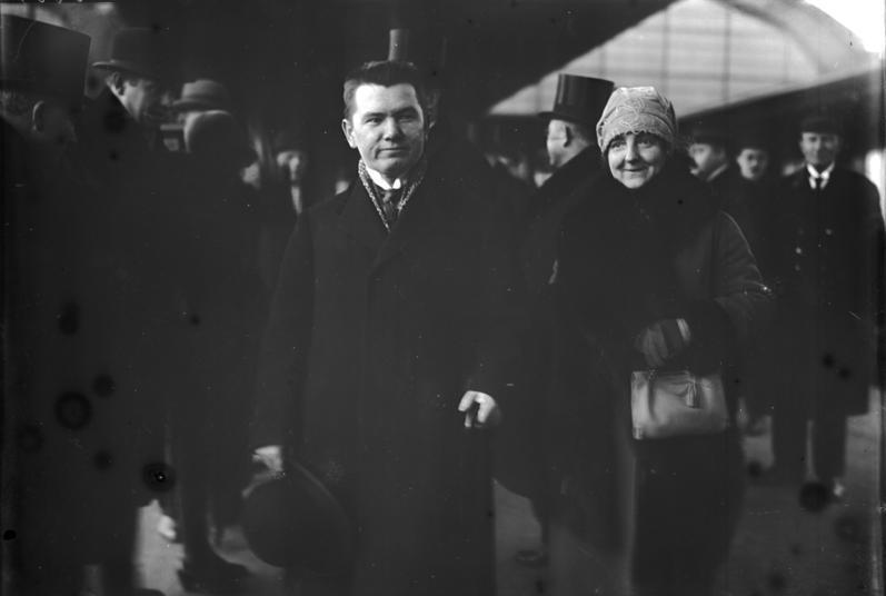 Der litauische Ministerpräsident und Aussenminister Prof. Woldemaras ist in Berlin eingetroffen, um mit dem Reichsaussenminister Dr. Streesemann einen neuen Handelsvertrag zwischen Deutschland und Litauen abzuschliessen. Der litauische Ministerpräsident und Aussenminister Prof. Woldemaras mit seiner Gattin bei seiner Ankunft auf dem Bahnhof Friedrichstrasse in Berlin.